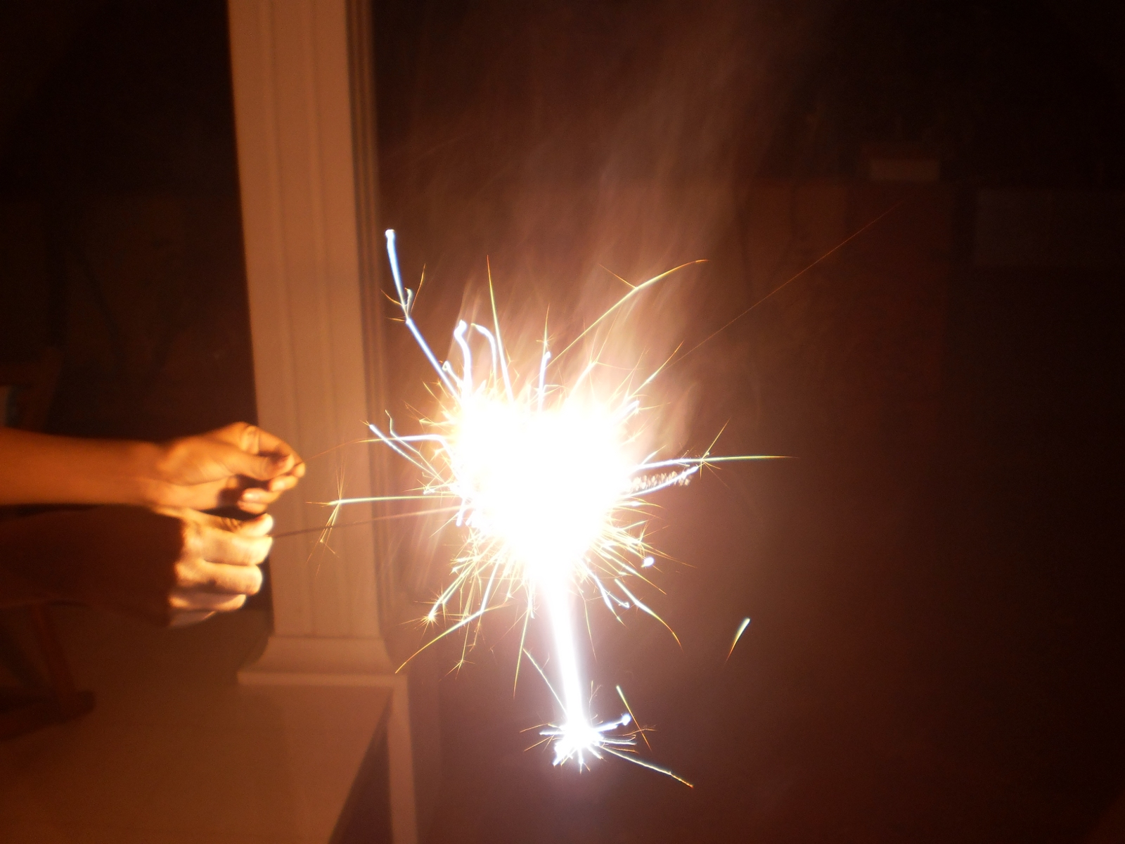 കമ്പിത്തിരി - കത്തുന്നു